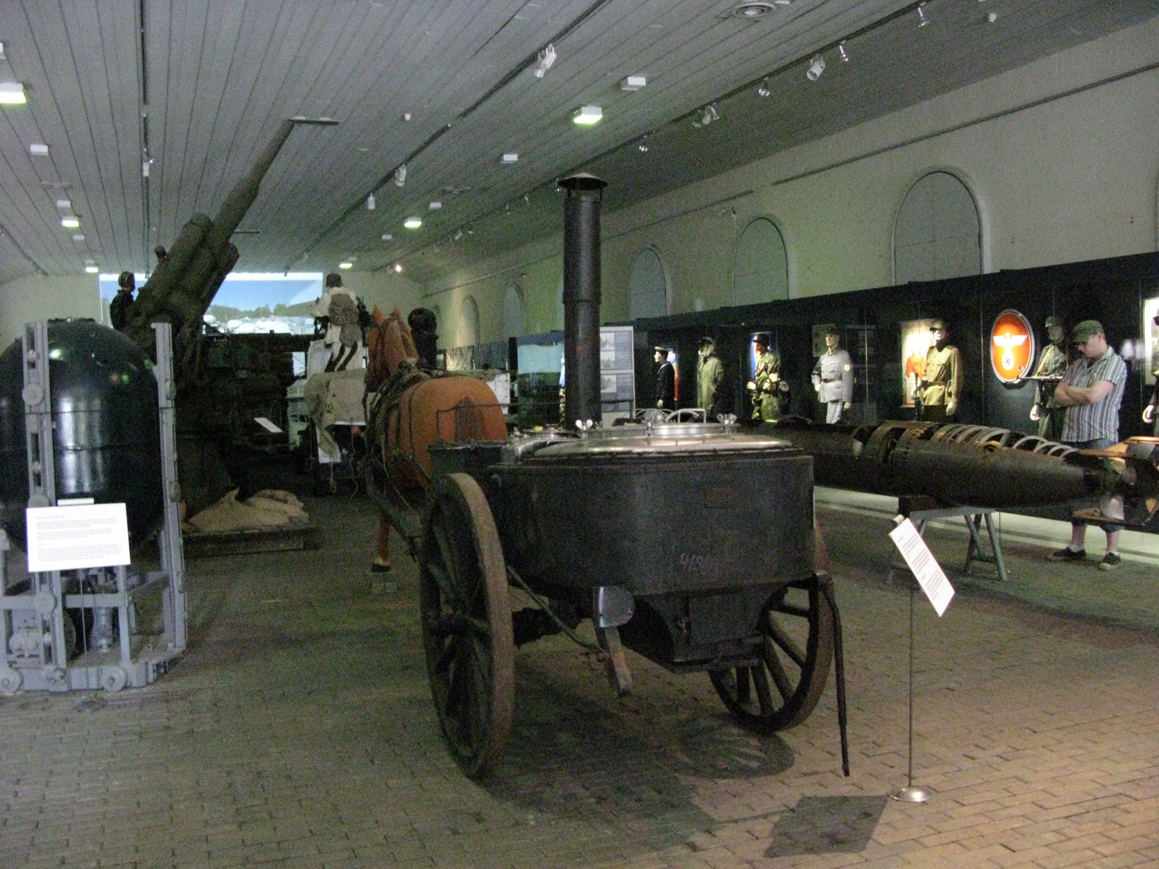 Hevosvetoinen kenttäkeittiö Maneesissa